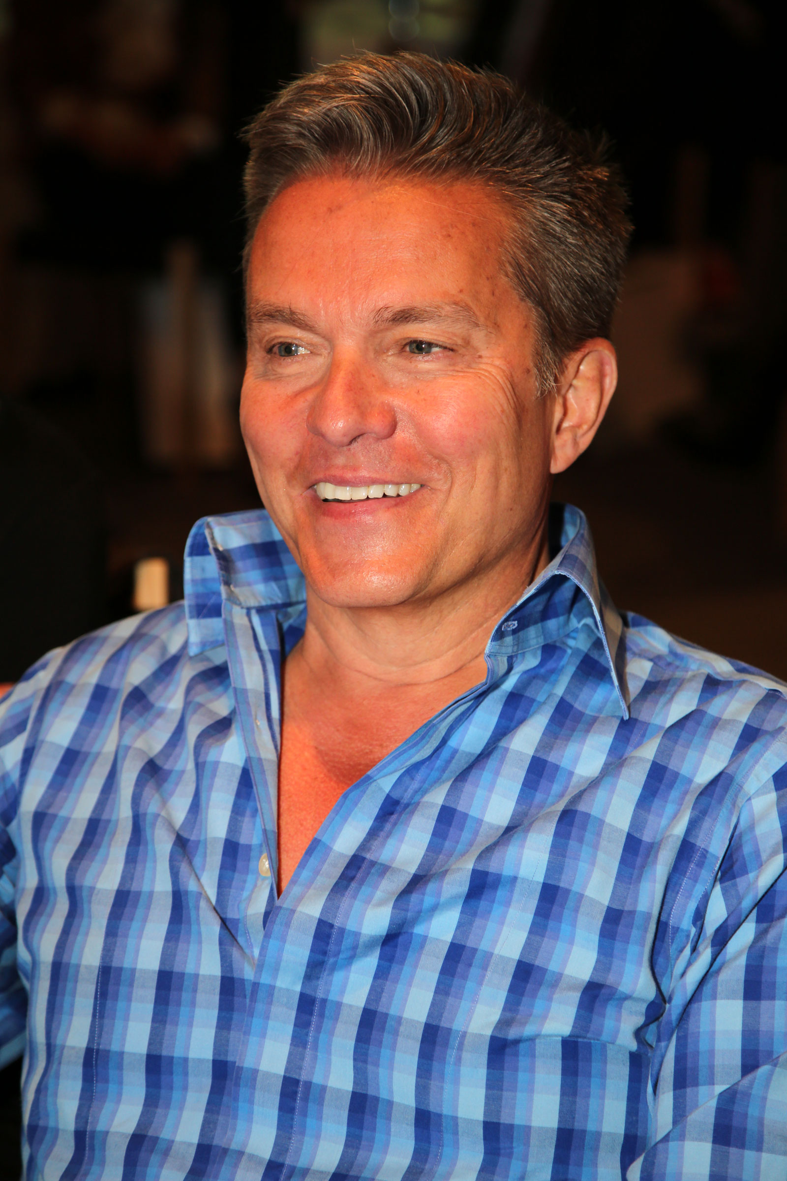 Haider_Alfons-3607